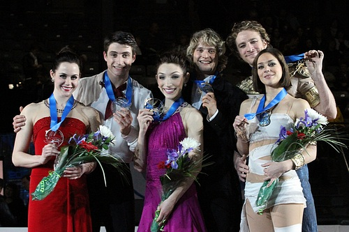 Подиум в танцах на льду в финале Гран-при по фигурному катанию сезона 2011-2012. Слева на право: Тесса Вертью / Скотт Моир (2-е место), Мэрил Двис / Чарли Уайт (1 место), Натали Пешала / Фабьян Бурза (3-е место)